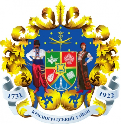 Русиньскый: Красноградський район